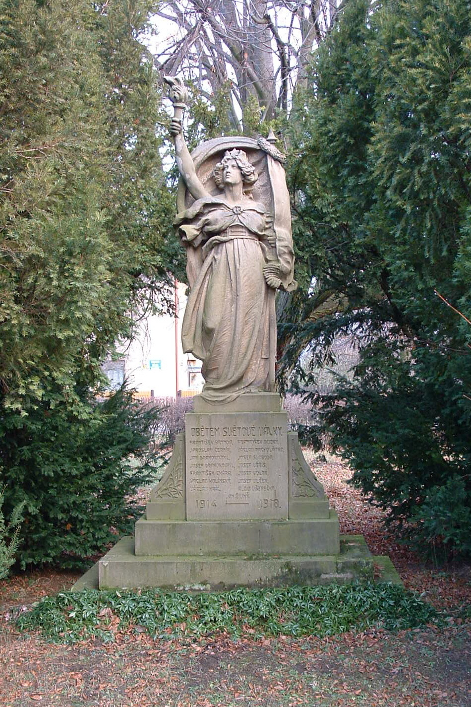 Památní se sochou Svobody